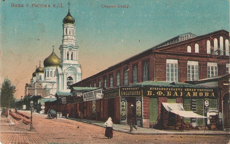 Старый базар (Центральный рынок) Ростова-на-Дону в 1906 году.